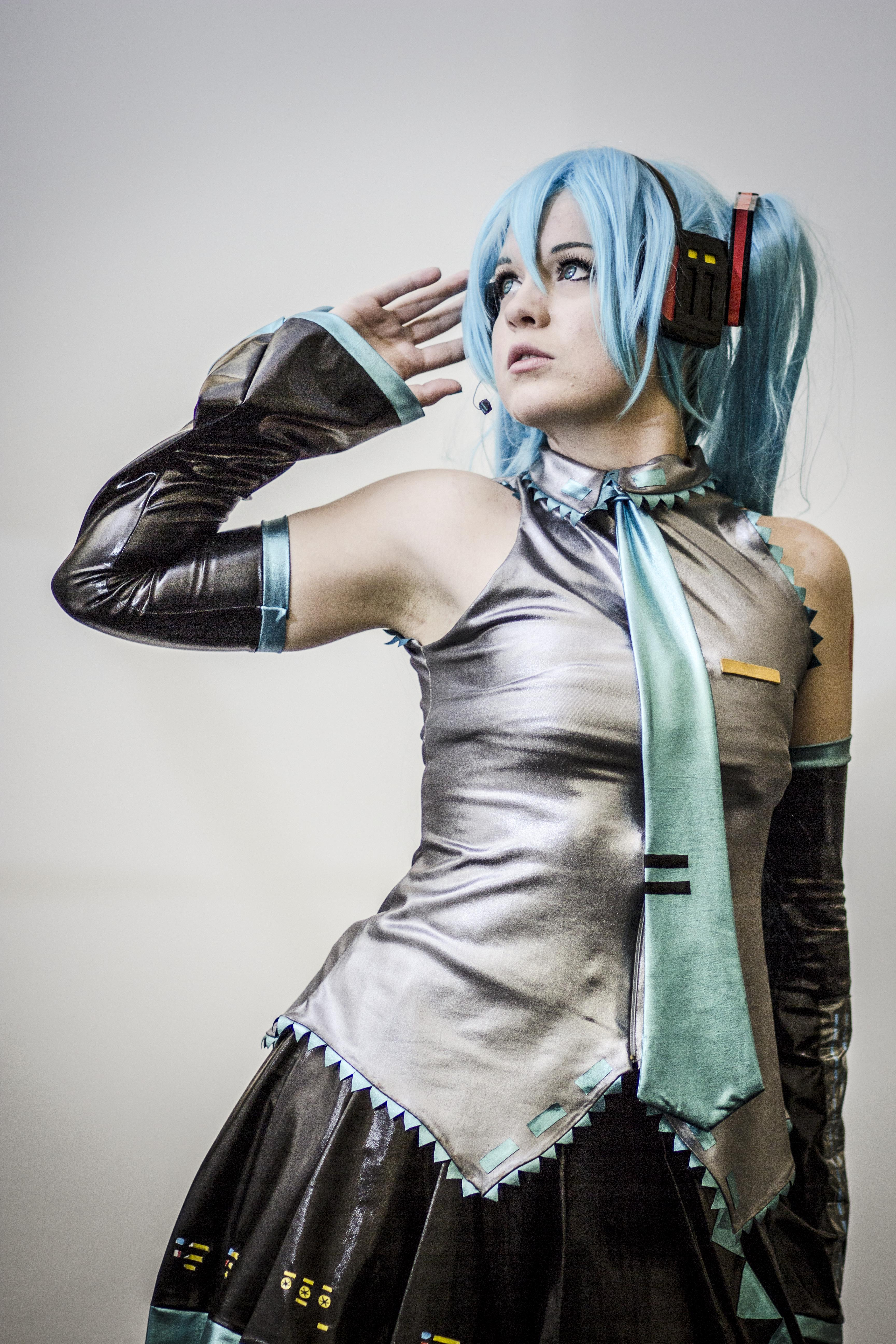 Animefest 2014，初音未來cosplayer。